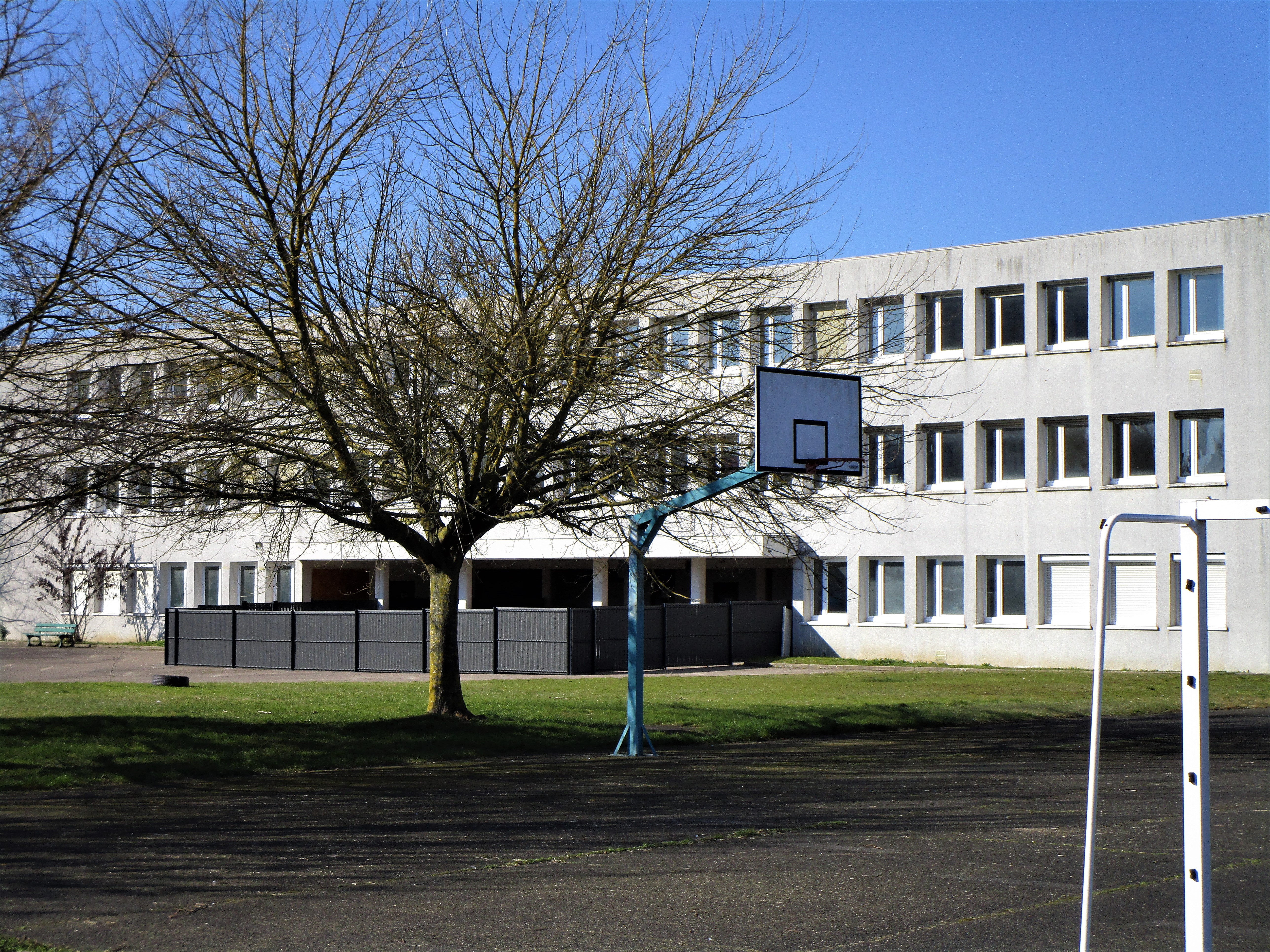 Façade sud de l'ancien collège Pasteur dans le quartier du Sanitas, à Tours.